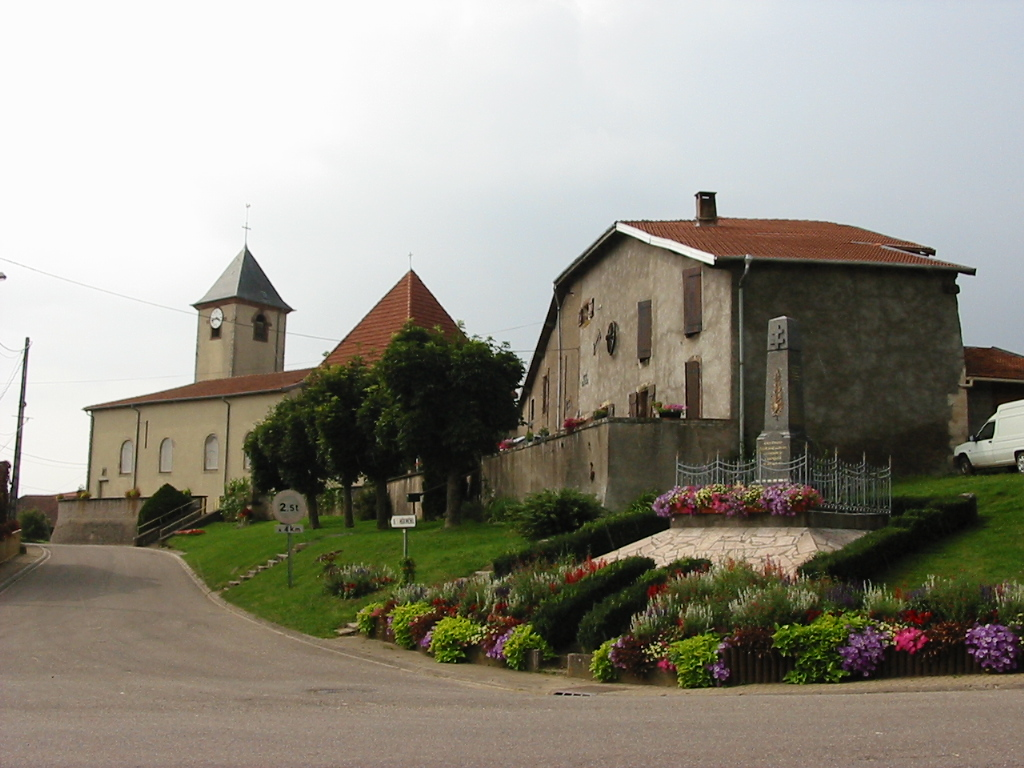 Rue de l'Église à Fraimbois (Meurthe-et-Moselle)